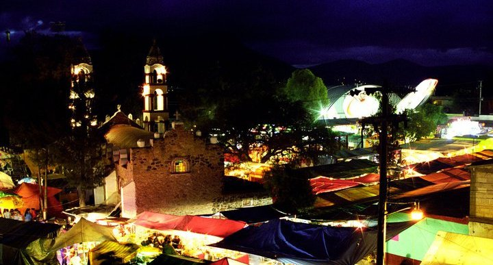 Feria de Caxuxi